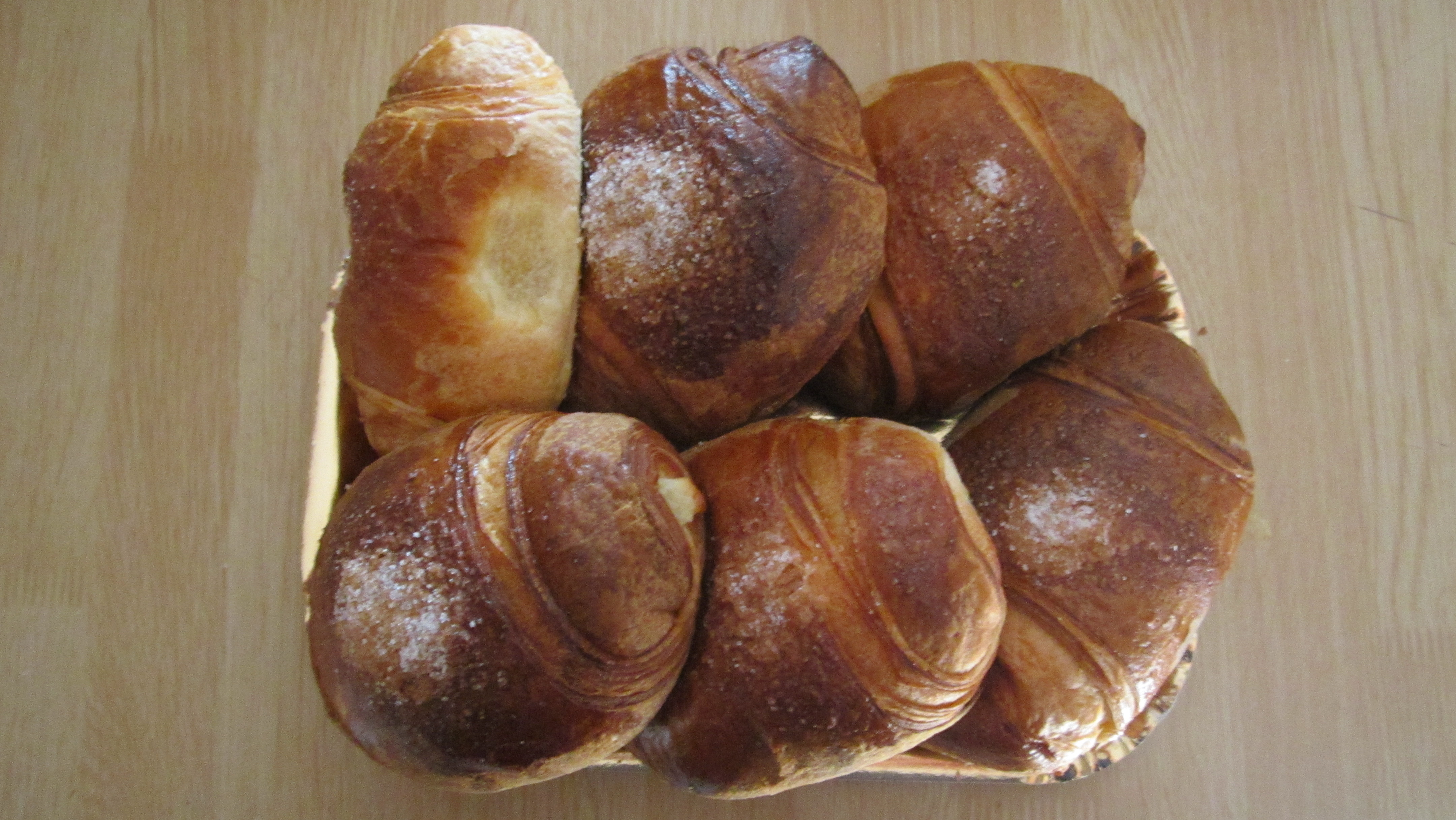 Polacche aversane, dolce tipico della Città di Aversa